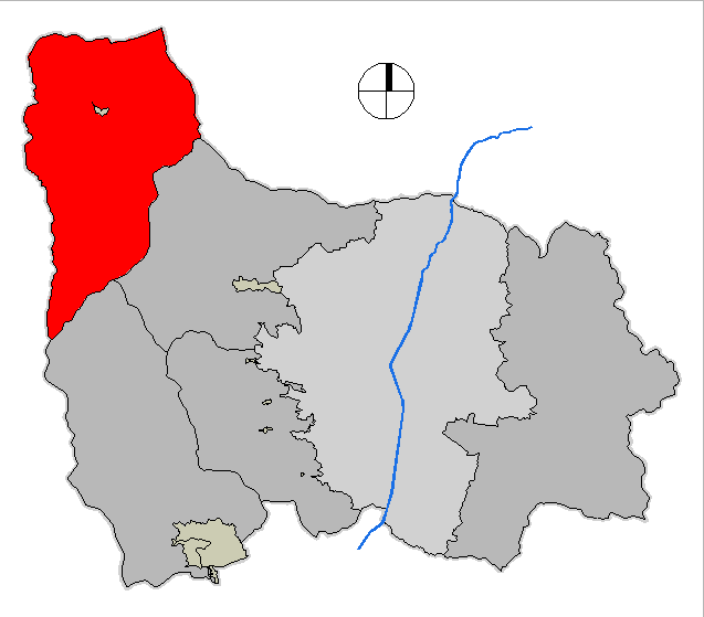 mapa del Corregimiento de San Sebastian de Palmitas. Medellín, Colombia.